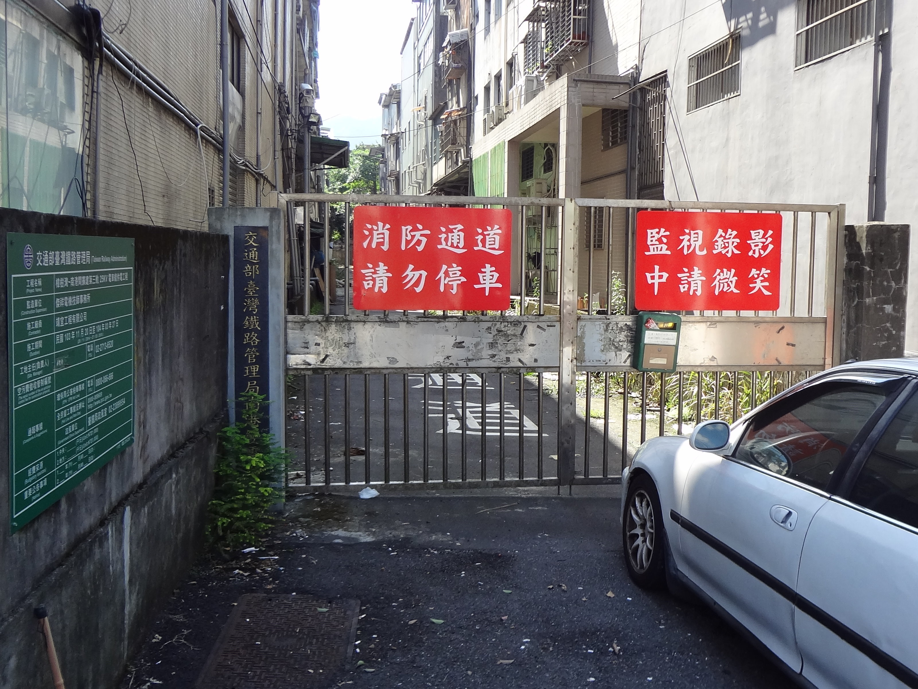 臺灣鐵路管理局南港變電站大門，位於新北市汐止區大同路一段，無門牌。